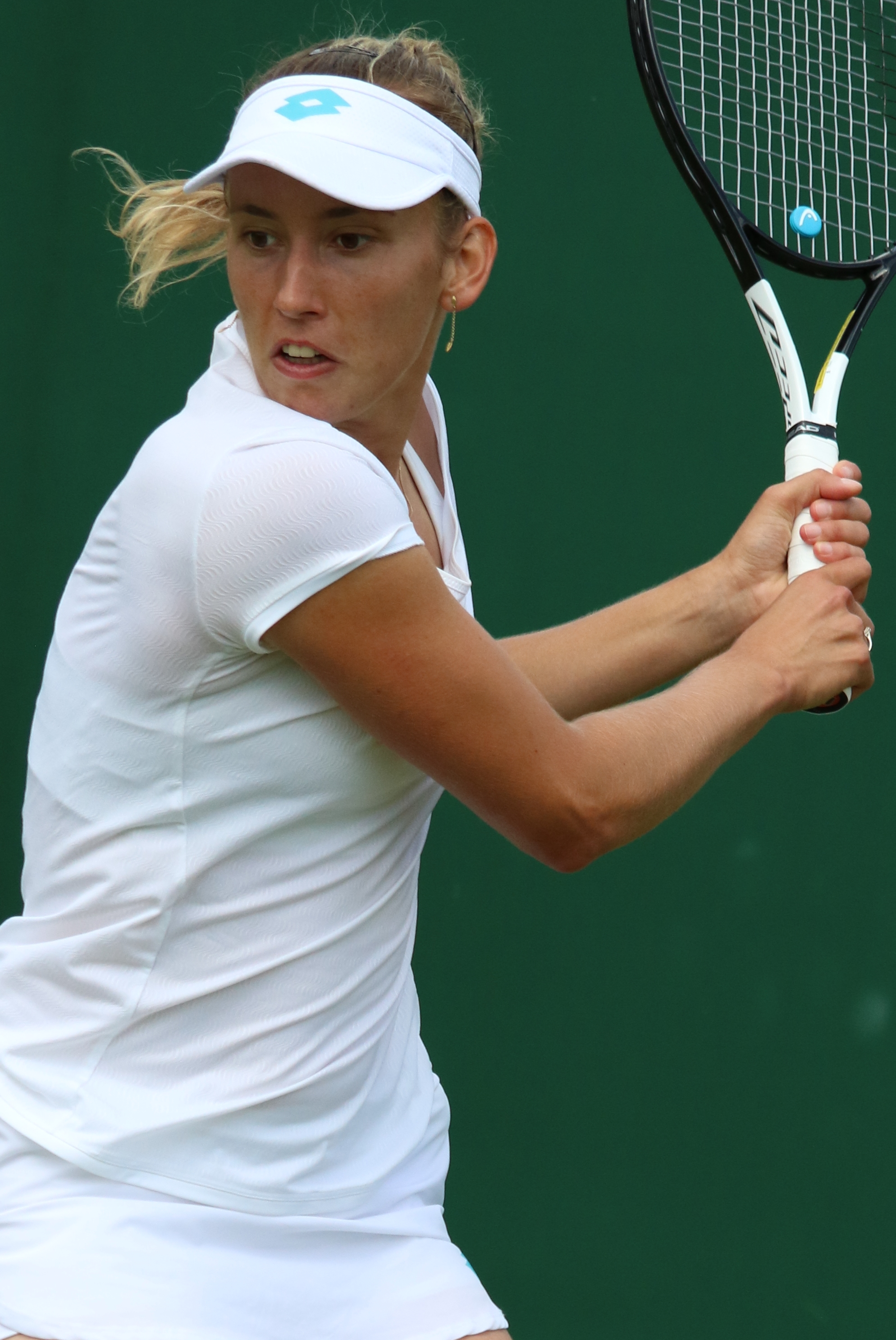 Mertens WM19 (27)